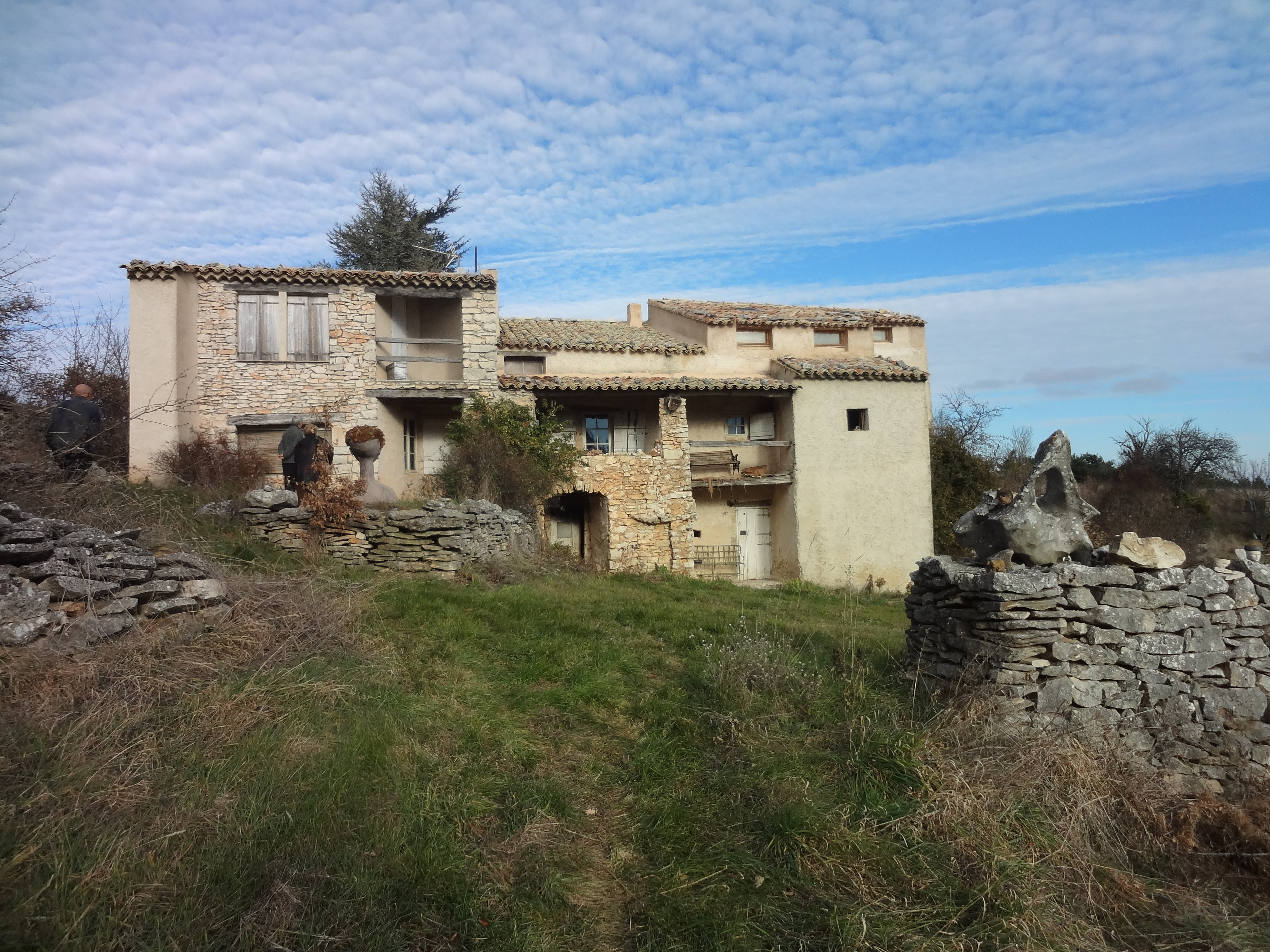 ferme abandonnée en 1943, occupée par des maquisards qui ont été arrếtés dans la nuit du 5 décembre. Son apparence telle que sur cette photo a peu changé.